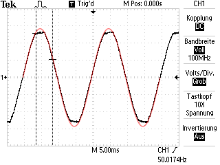 Durch Vielzahl von nichtlinearen Verbraucher und deren Verzerrungsblindleistung wie PC-Netzteile und Energiesparlampen im harmonischen (sinusförmigen) Verlauf verzerrte Netzwechselspannung. Deutlich zu erkennen die Abflachung im Bereich der Extremwerte. Zum Vergleich in hellen rot der ideale sinusförmige Verlauf über zwei Perioden. Netzspannung mit 230V eff. Gemessen an der Niederspannungsseite einer Transformatorenstation (Hauptverteilung).